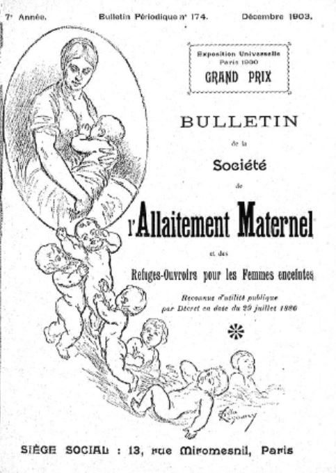 couverture du bulletin de la Société pour la propagation de l'allaitement maternel de décembre 1903 (fondée par Marie Béquet de Vienne